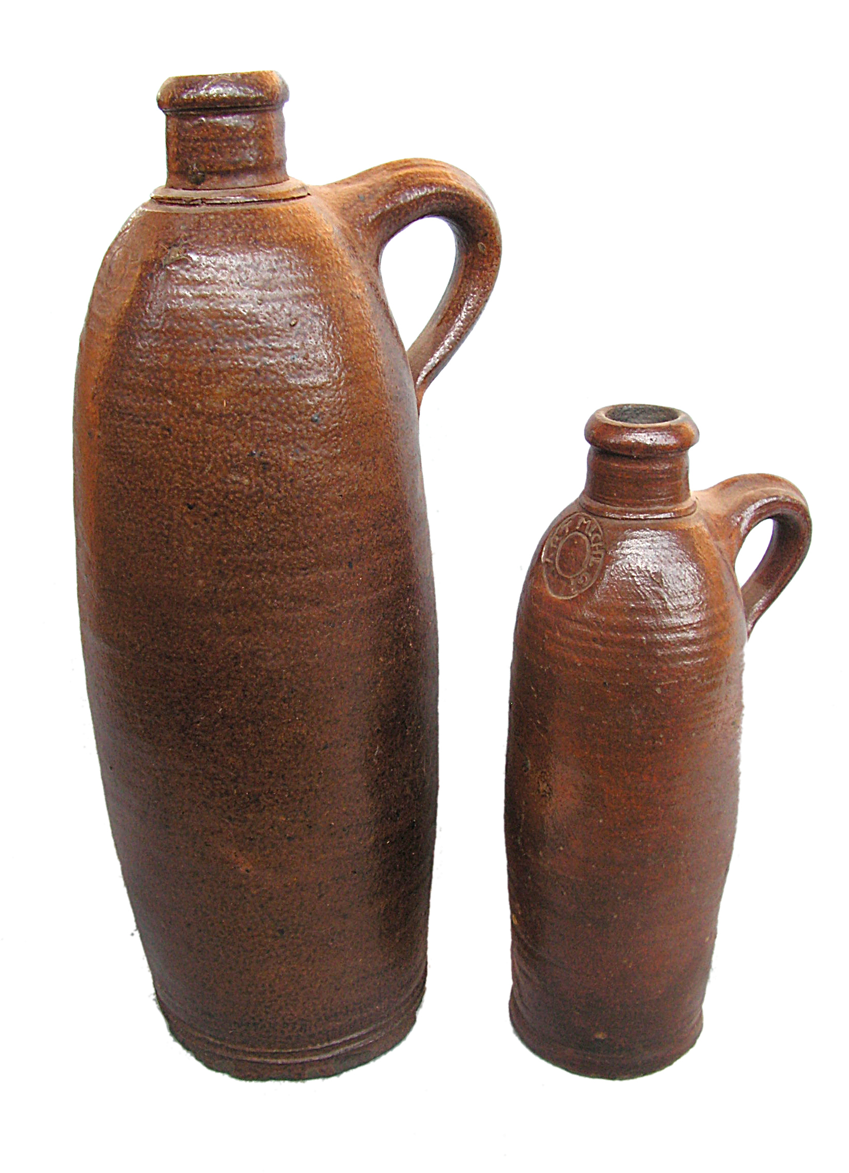 Wasserflaschen aus Steinzeug aus Niederbayern / Rottal